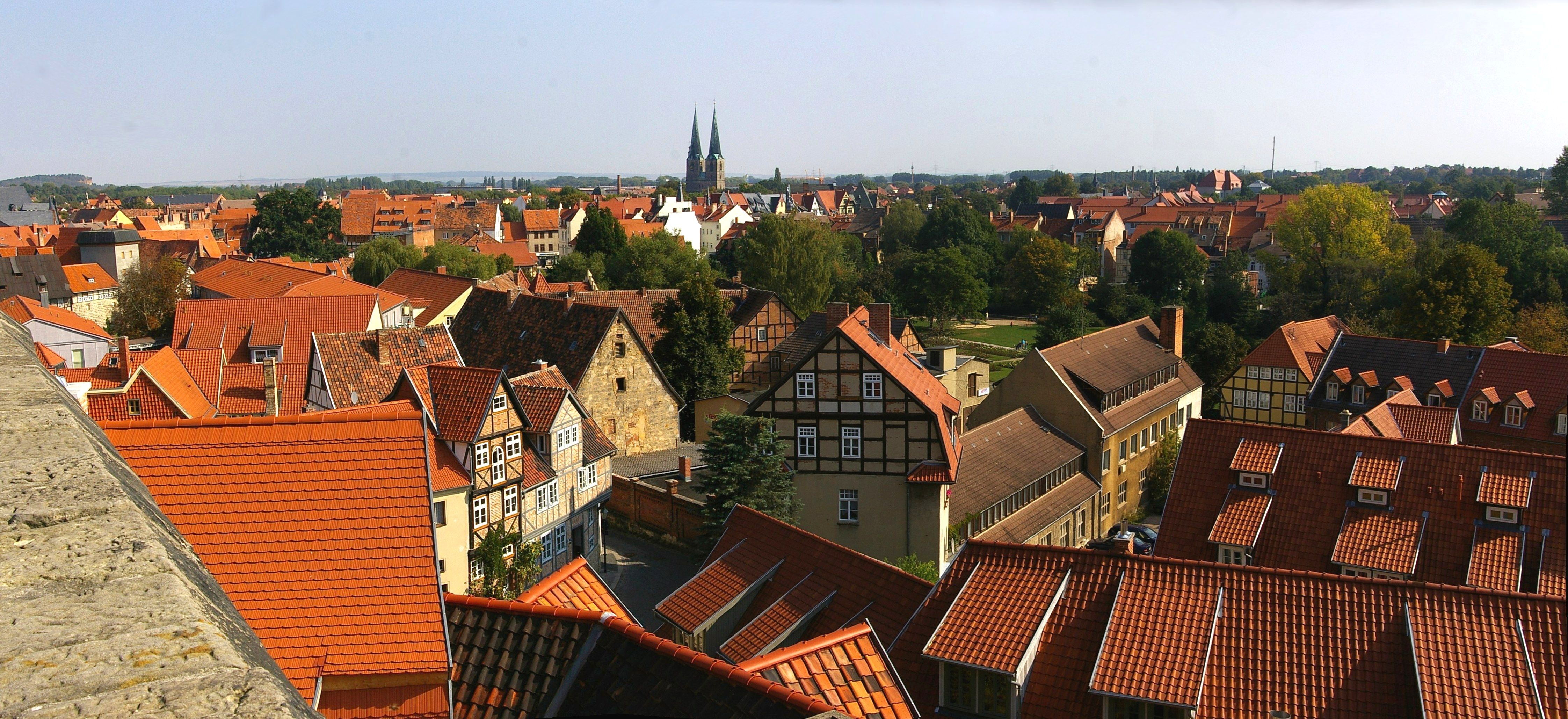 Quedlinburg - Überblick über die Stadt vom Schlossberg aus